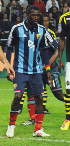 Djurgårdens IF Player Yussif Chibsah.